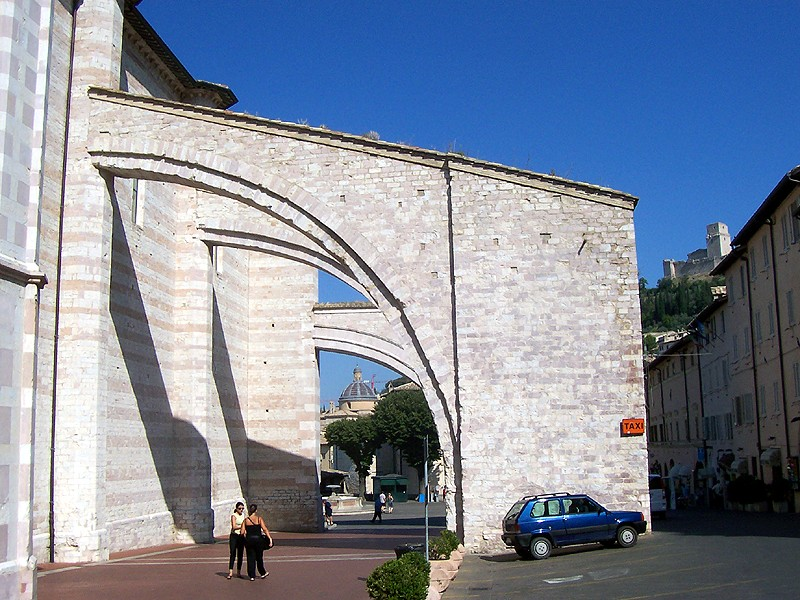 Assisi - Archi rampanti della Basilica di S. Chiara